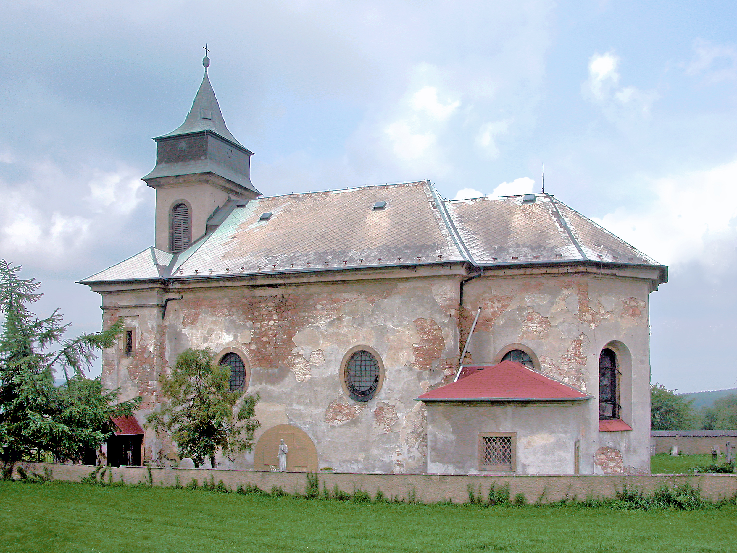 04.07.2009 CZ 41732 Cinovec (Dubi): Kostel Nanebevzeti Panny Marie (GMP: 50.732797,13.776252). Bis 1945 HinterZinnwald bzw. Bömisch Zinnwald: Katholische Kirche Maria Himmelfahrt (Spätbarock 1732). Sicht von Süden. [DSCN38113.TIF]20090704235DR.JPG(c)Blobelt